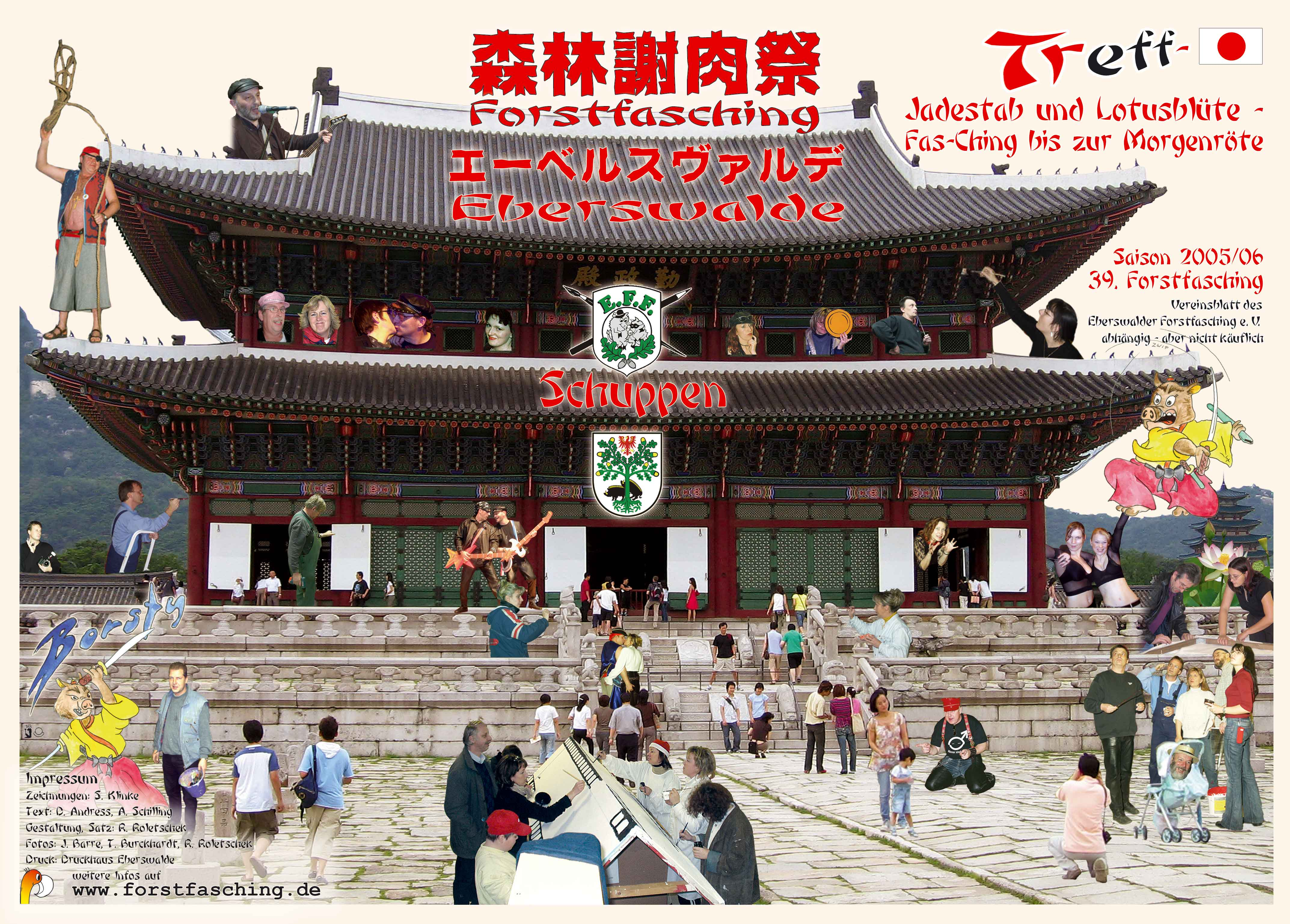 Das große Ursprungsbild stammt von Benutzer:iGEL, 40 Fotos sind von mir, eins von Thomas Burckhardt, die Zeichnungen von Stefan Klinke. Das Original hat 4291 x 3075 Pixel bei 355 DPI und eine Dateigröße von 123 MB. Die Montage selbst steht unter den freien Lizenzen, sofern eine eigene Schöpfungshöhe erreicht wird.